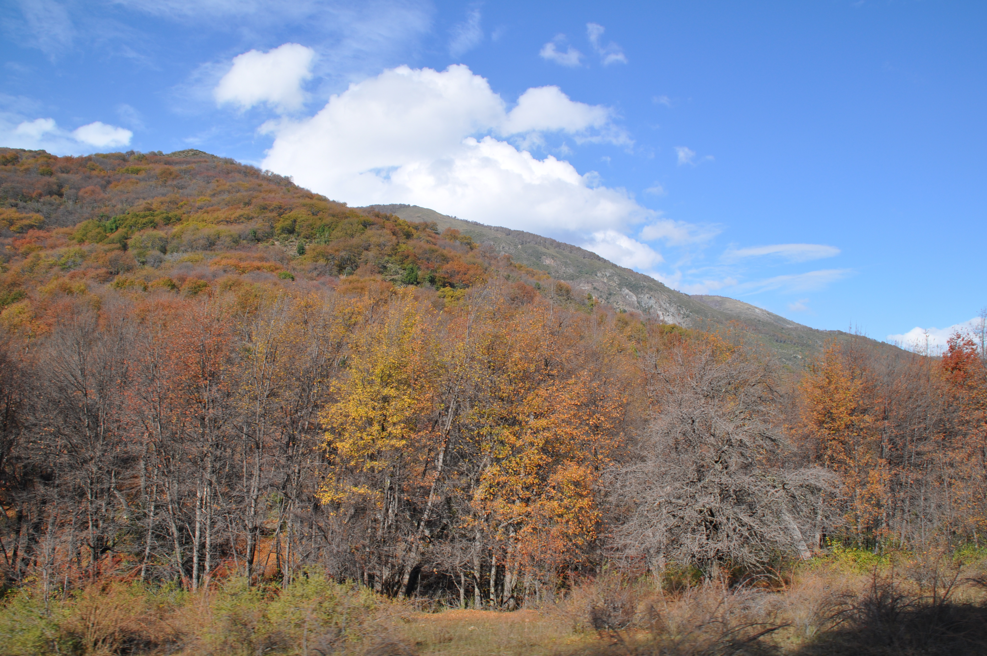 Cruzando una cuesta hacia cajón río Melado, Chile